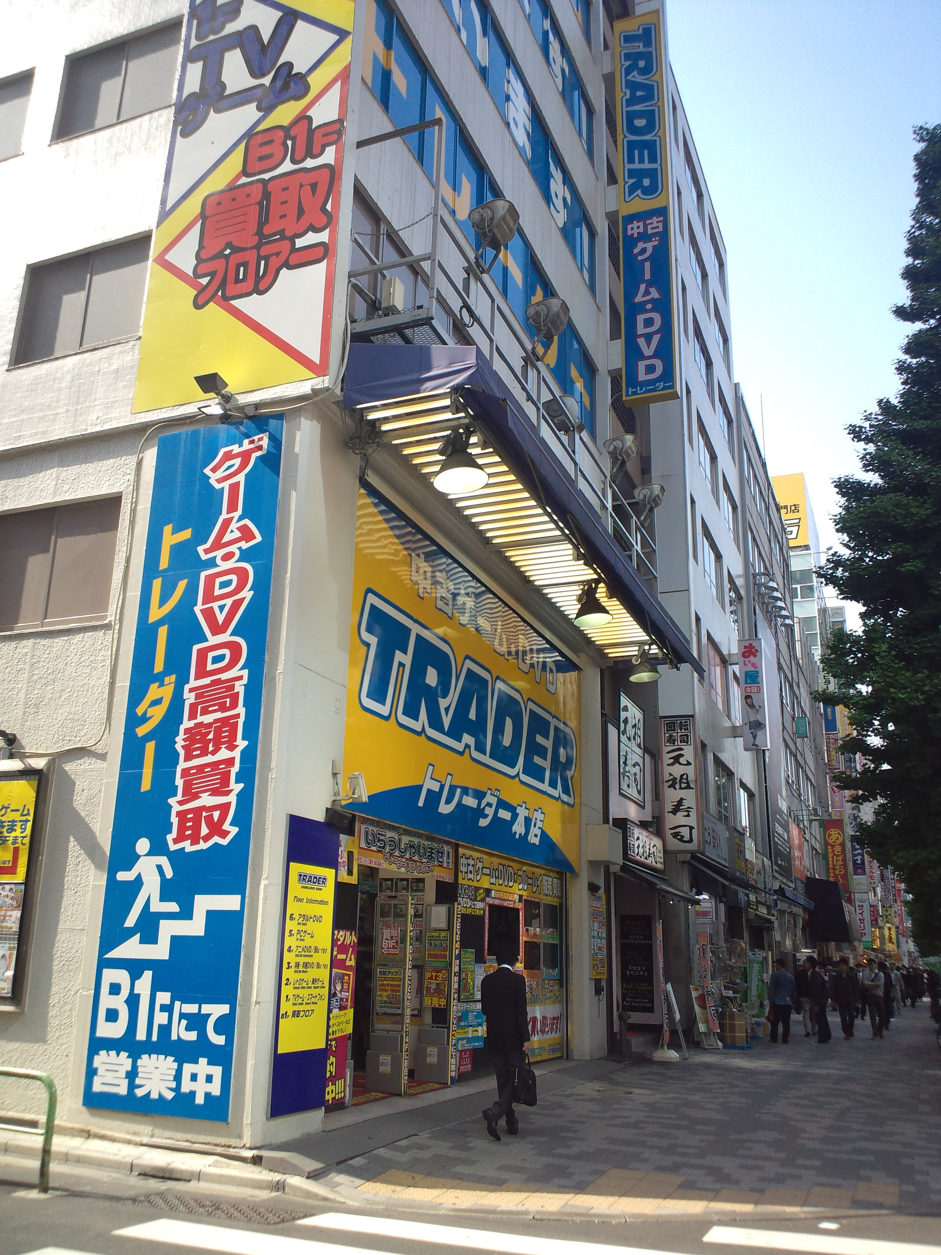 TRADER秋葉原本店。写真撮影時に取得したGPS情報が誤差が大きいものだったため、後から手動で修正しています。